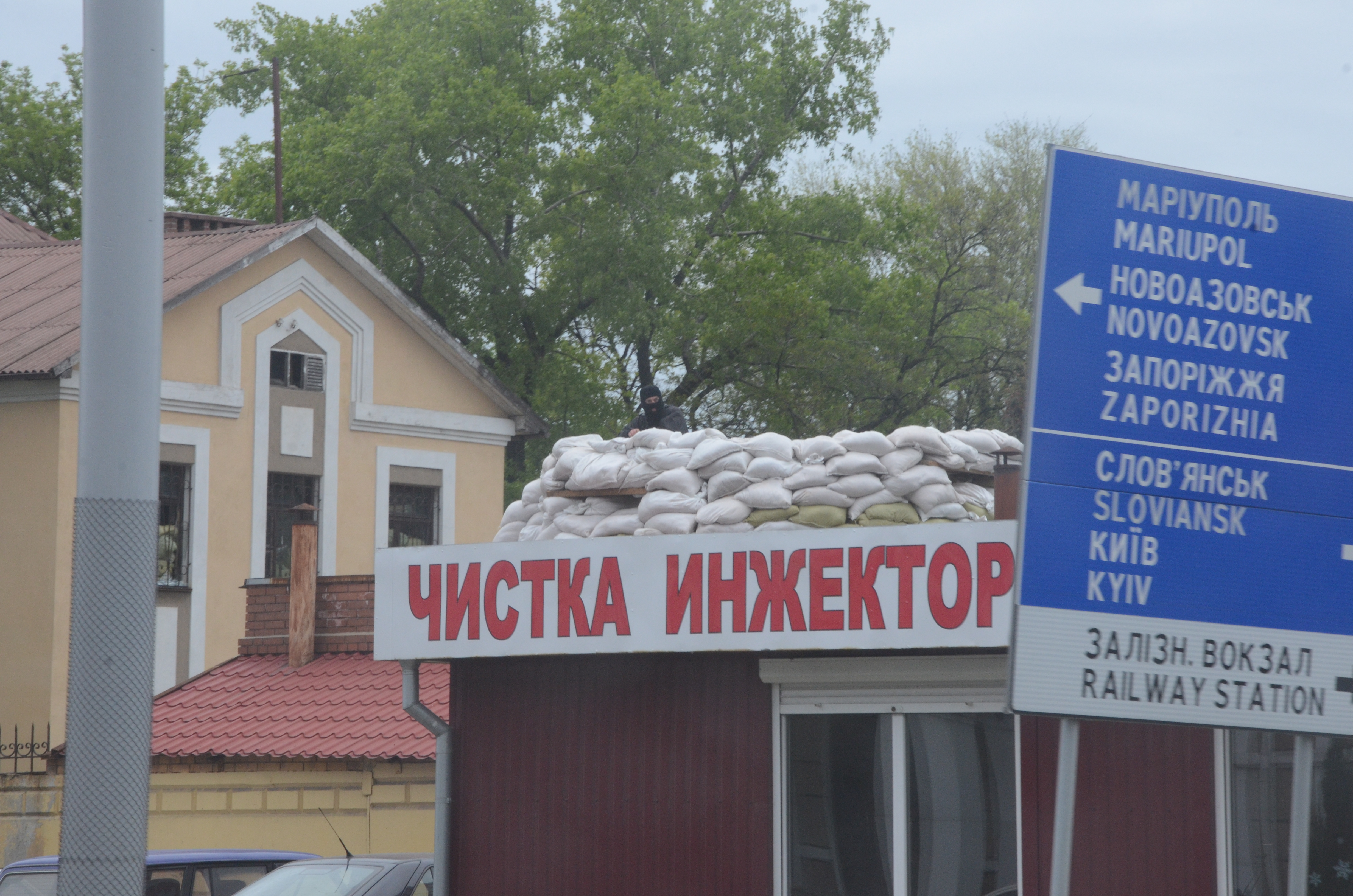 Протесты в Донецке